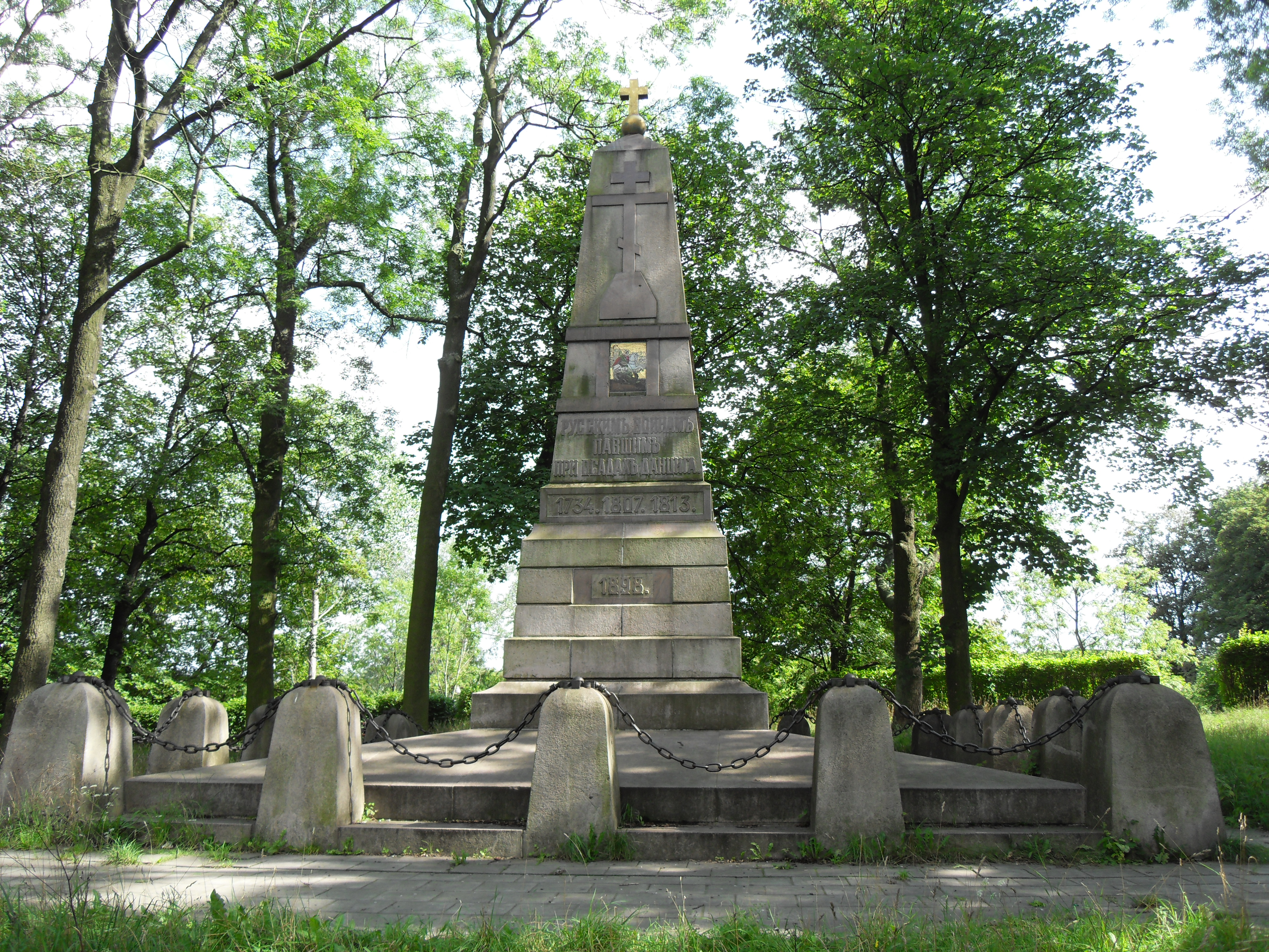 Grodzisko w Gdańsku. Pomnik z 1898 roku, upamiętniający żołnierzy rosyjskich poległych podczas oblężeń Gdańska w 1734, 1807 i 1813.